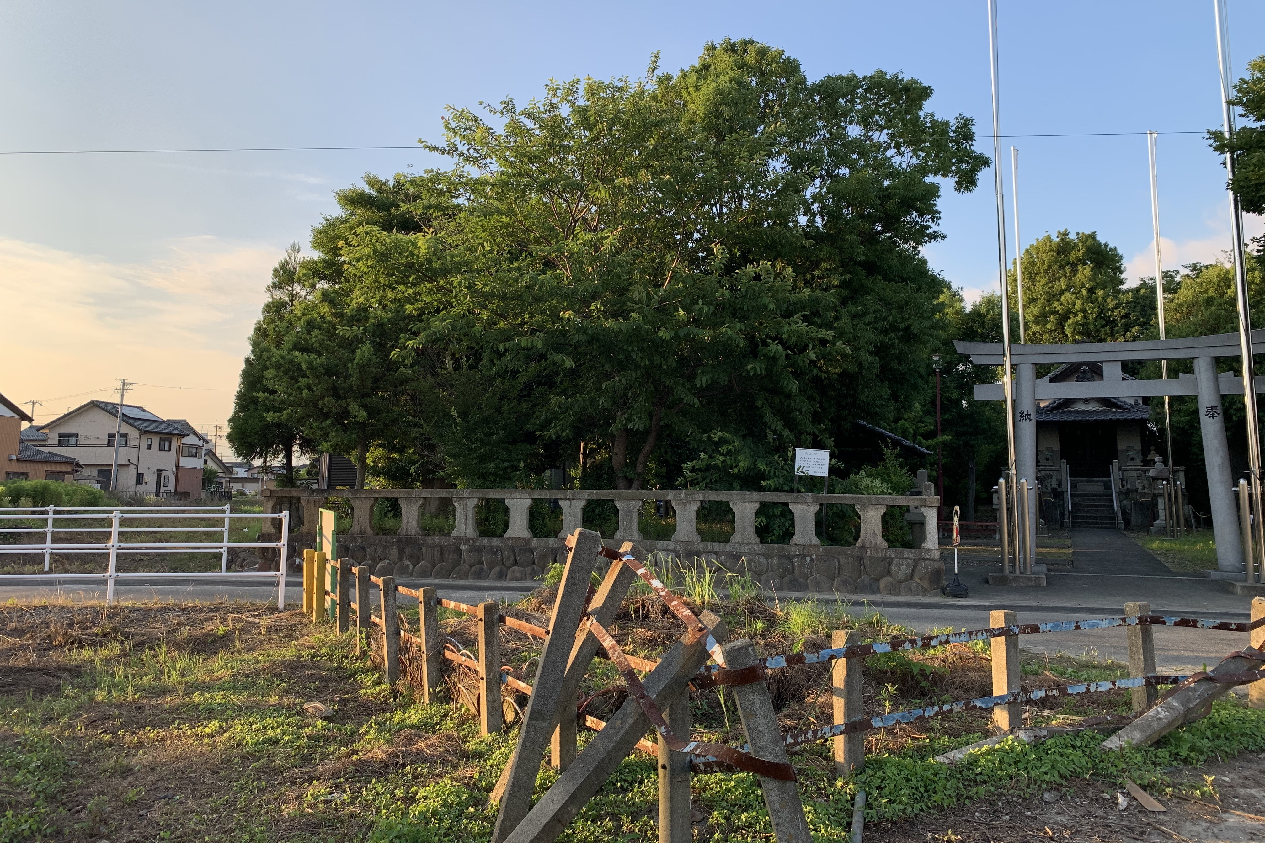 名鉄牧野駅跡（県神社と江吉良方面に伸びる線路跡）